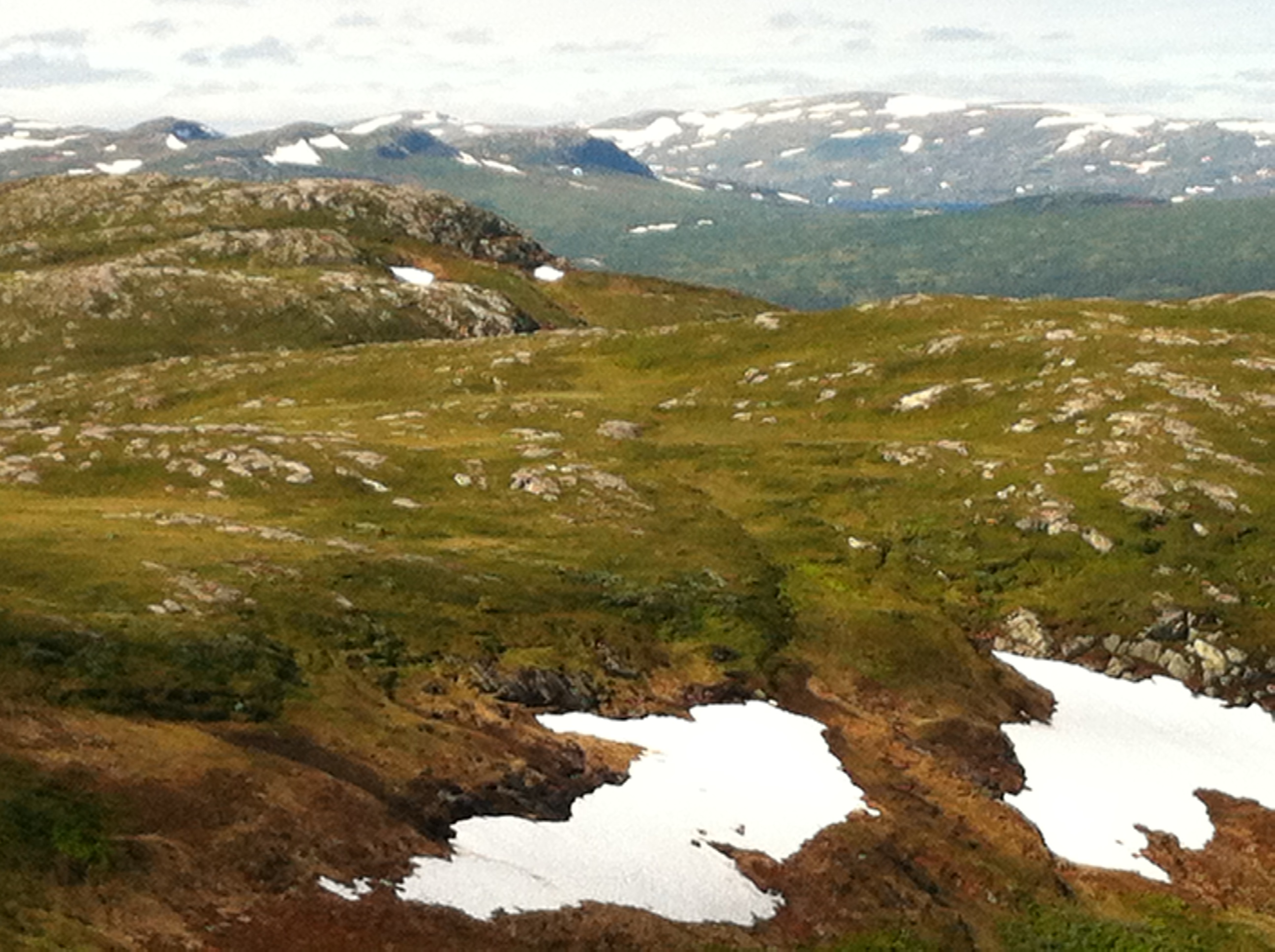 Vy från Oldklumpen, Offerdals socken, Krokoms kommun, Jämtlands län.